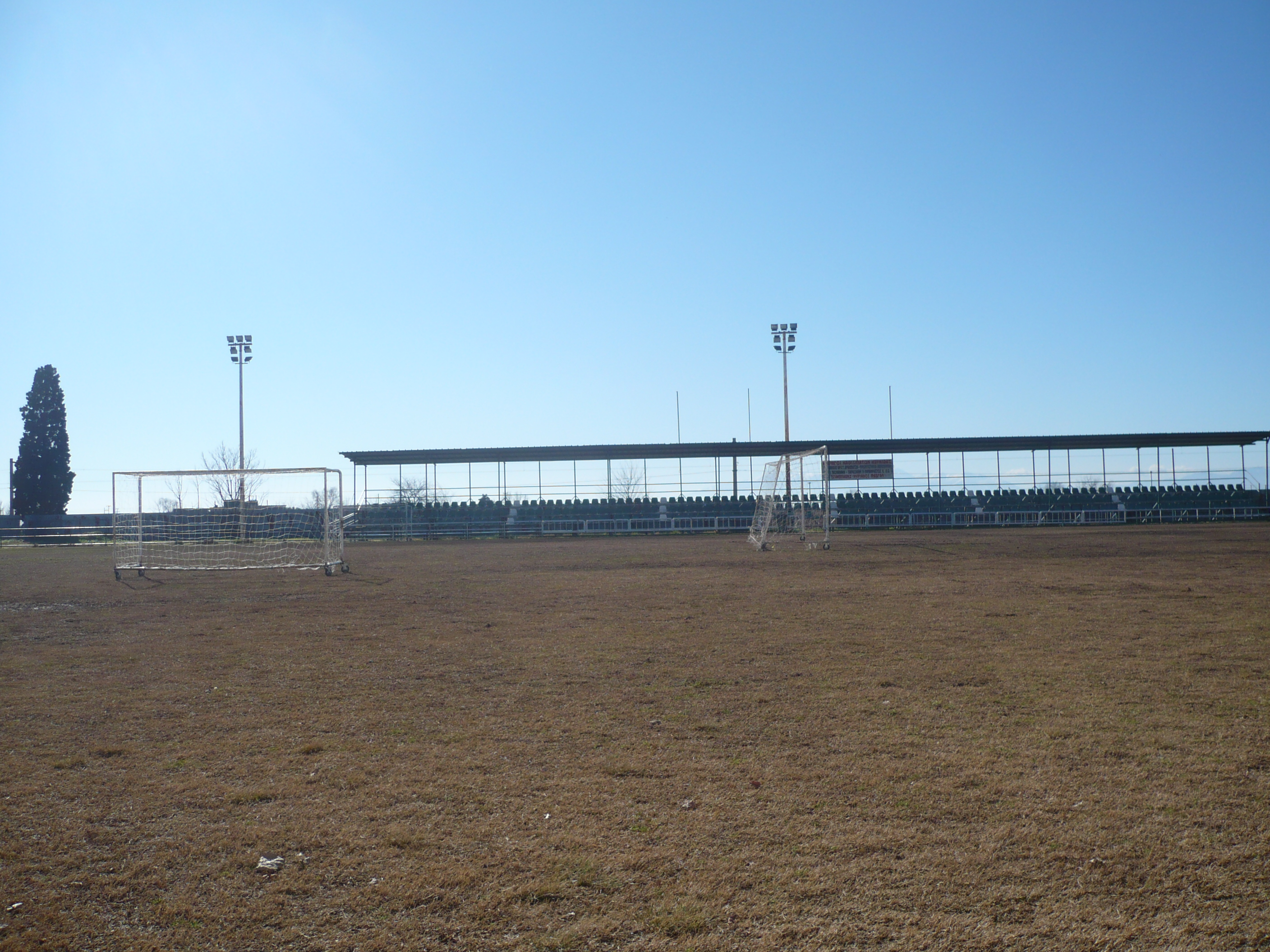 γήπεδο ποδοσφαίρου